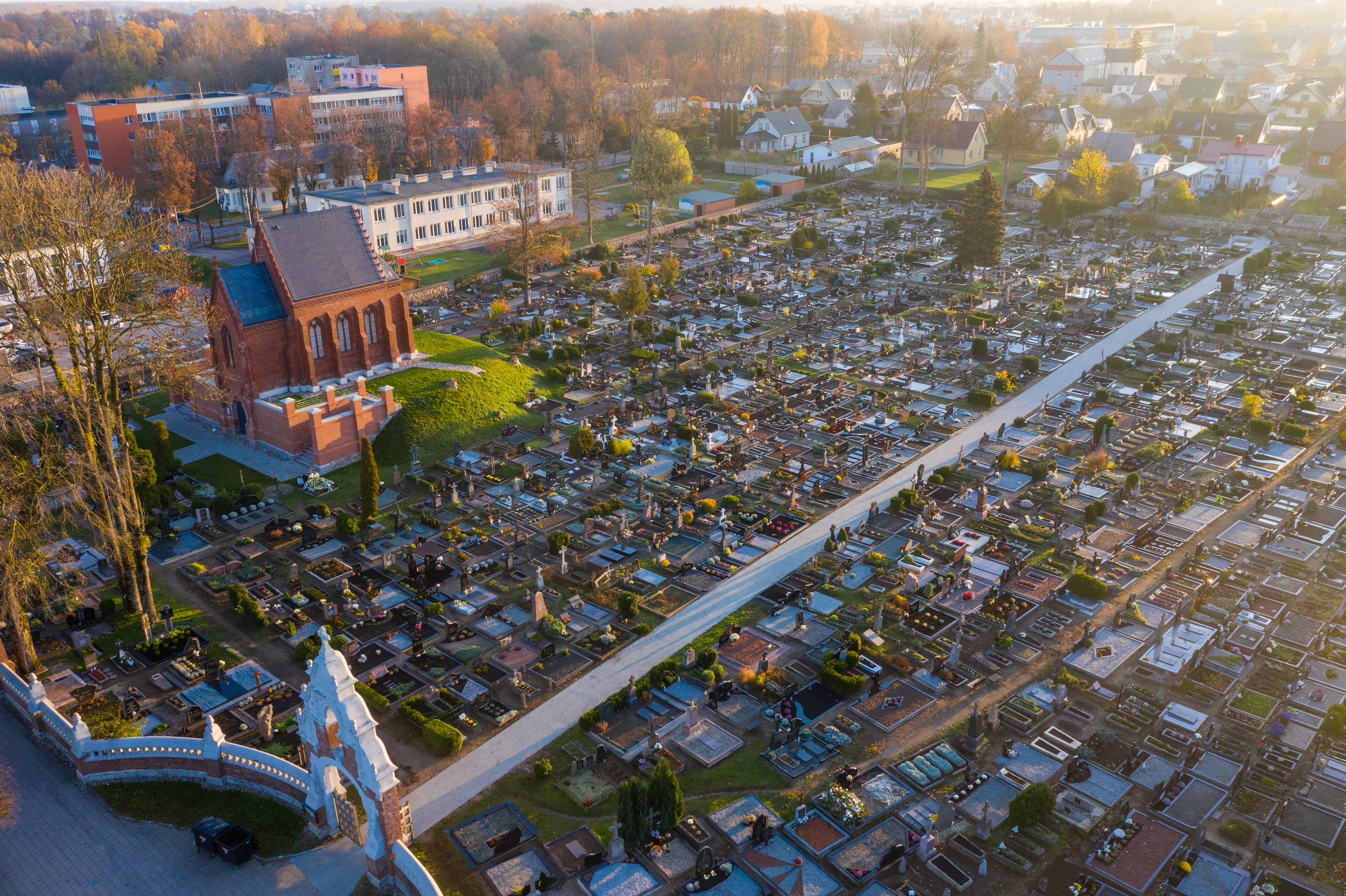 Iš paukščio skrydžio